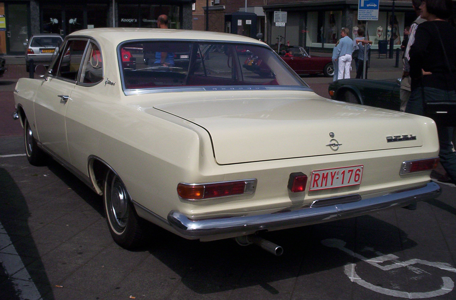 Achterkant Opel Rekord A Coupe Fotografeerd te Nederland door JM Janssen